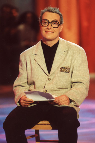 Corrado Guzzanti nei panni di Brunello Robertetti